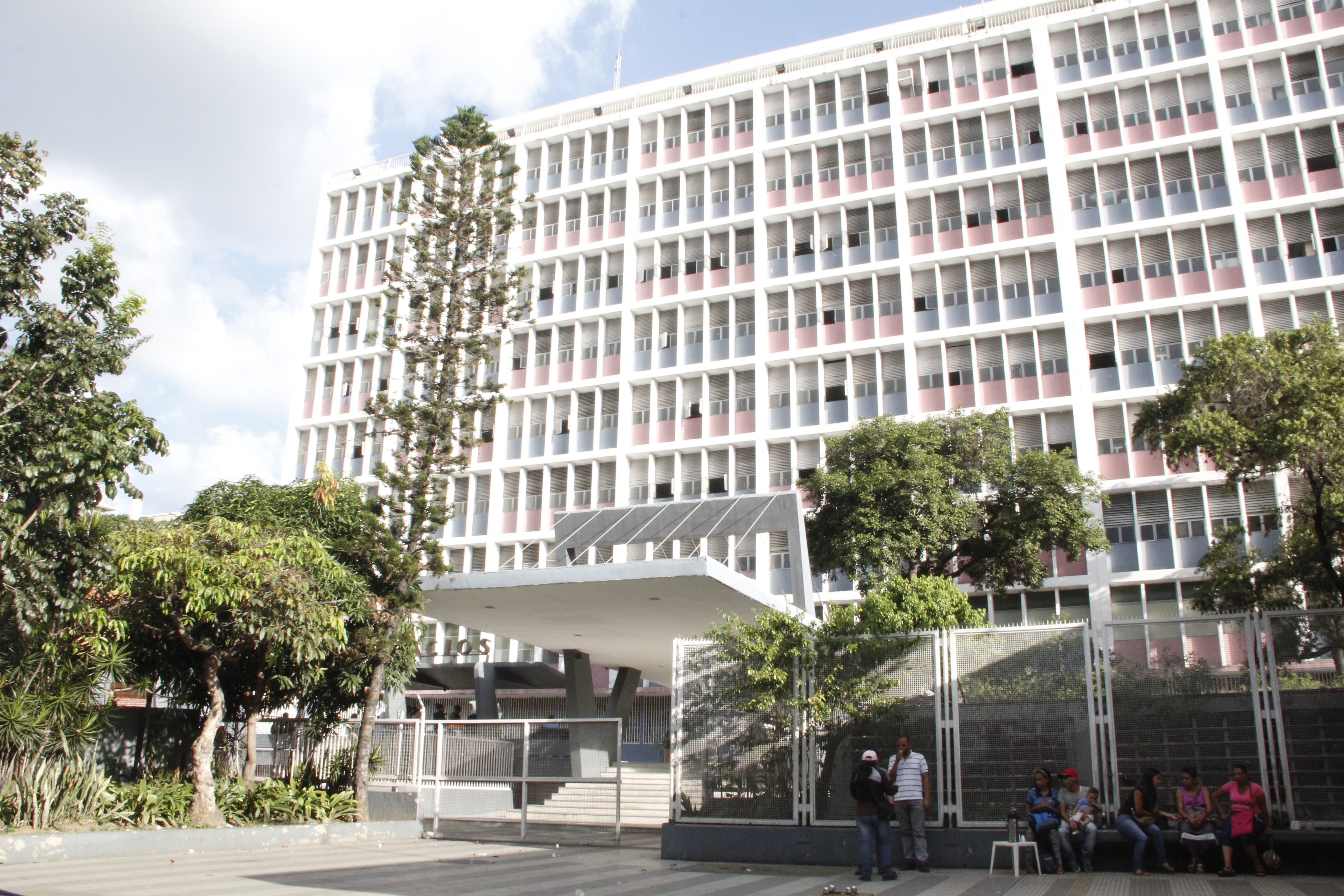 Maternidad Concepción Palacios, ubicada en la Avenida San Martin, Municipio Libertador, Caracas, Distrito Capital. Posee una estación en el sistema de metro de la ciudad con su nombre.